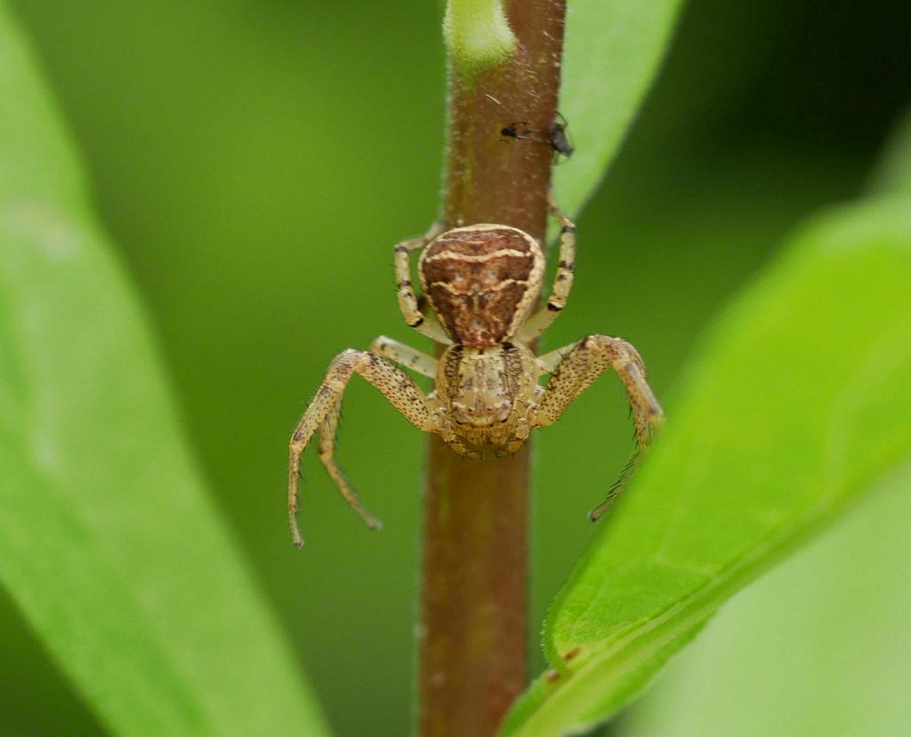 2019/05/29 和歌山県田辺市：Tanabe City. Wakayama Pref. Japan